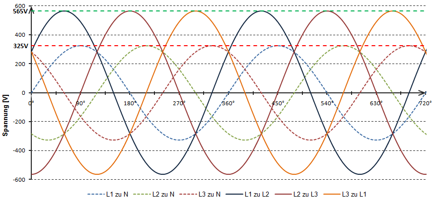 Diagramm zeigt den Verlauf von verketteter und nicht verketteter Spannung im Drehstromnetz.